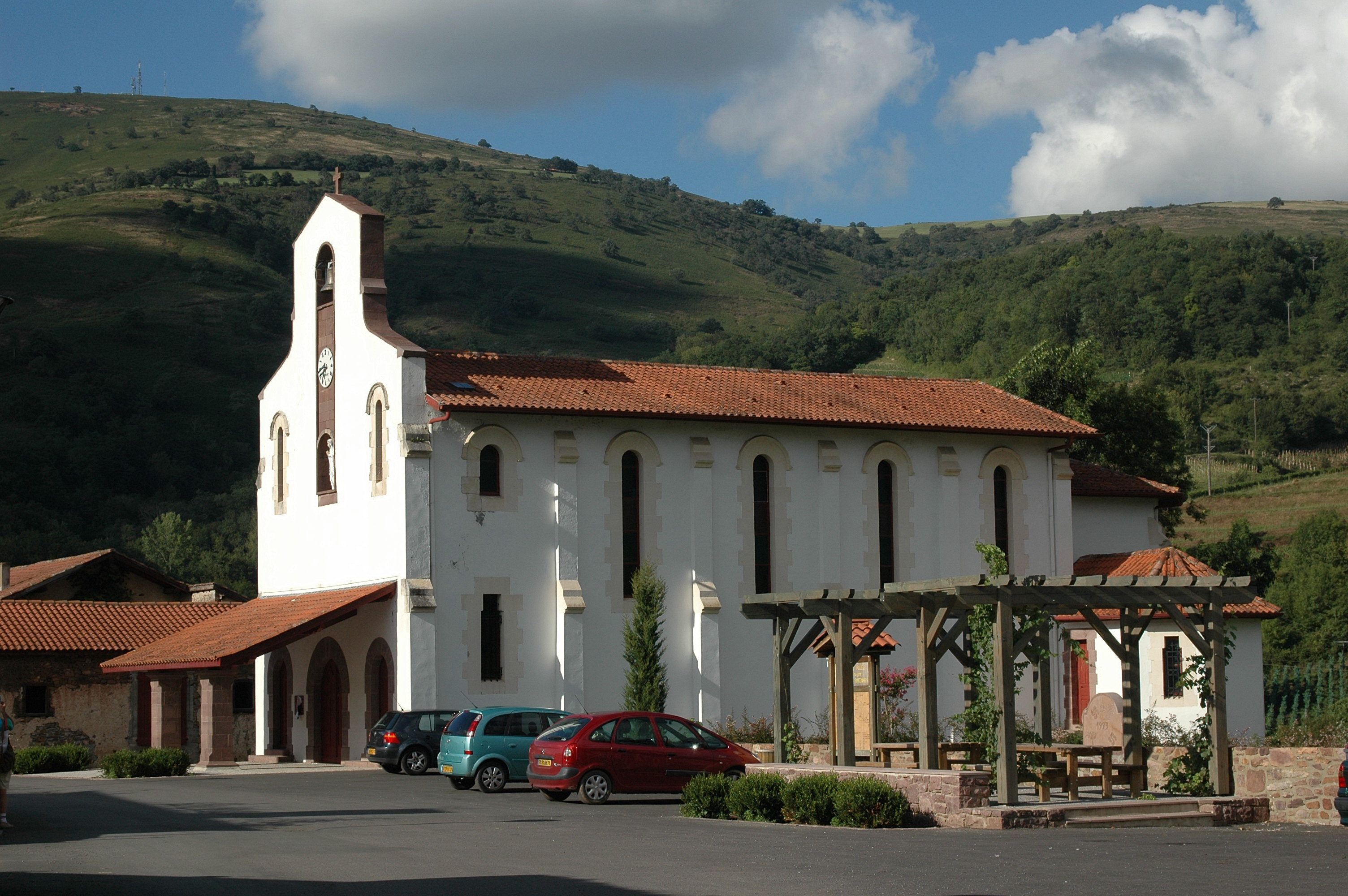 Irouléguy, l'église Saint-Vincent (1912). Photo prise le 03/08/06 par Harrieta171